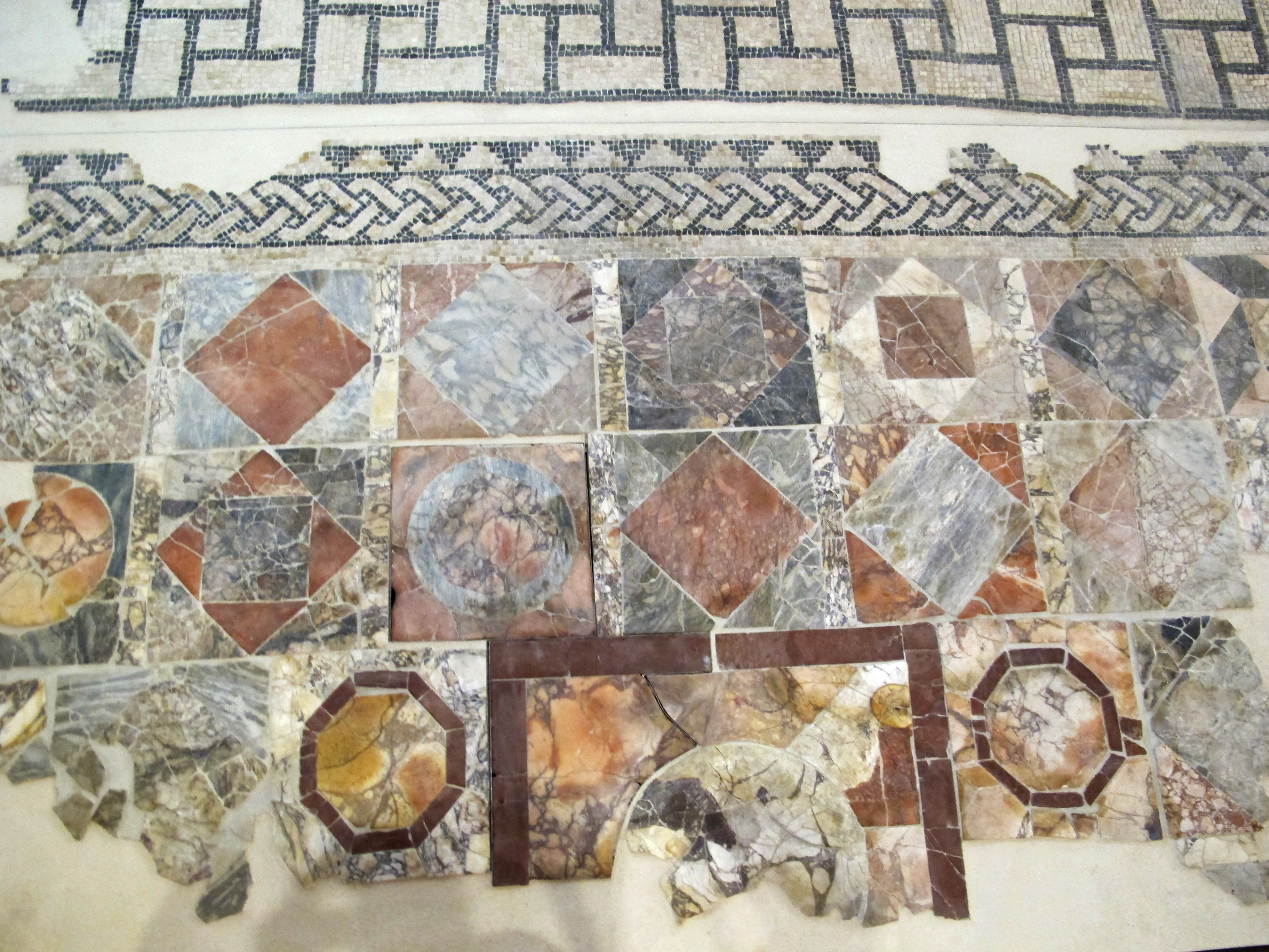 Opus sectile da triclinium terza domus dell'ex-vescovado di rimini, fine I-inizio II sec.